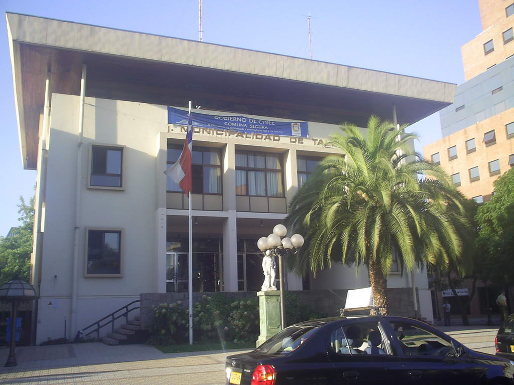 Frontis de la Municipalidad de Talca. Ubicación 1 Norte con 1 Oriente.